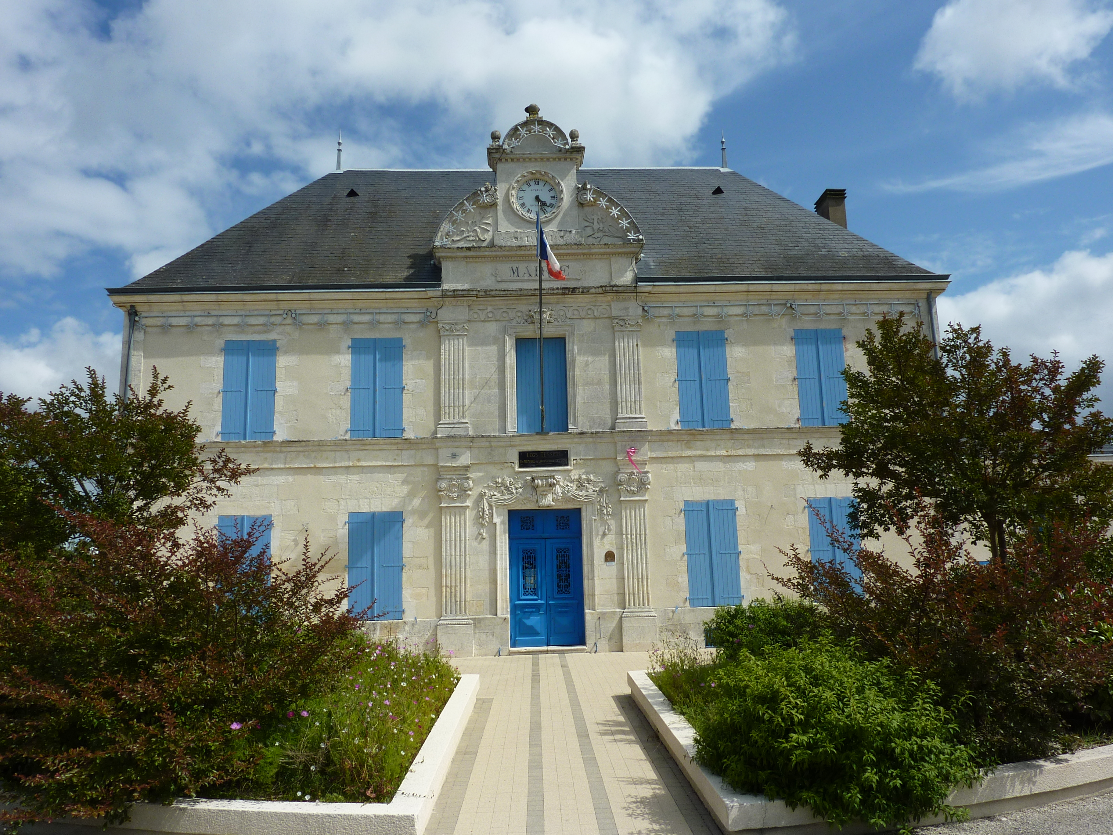 La mairie de Saint-Laurent-de-la-Prée en juillet 2012. Charente-Maritime, Poitou-Charentes, France, Europe.